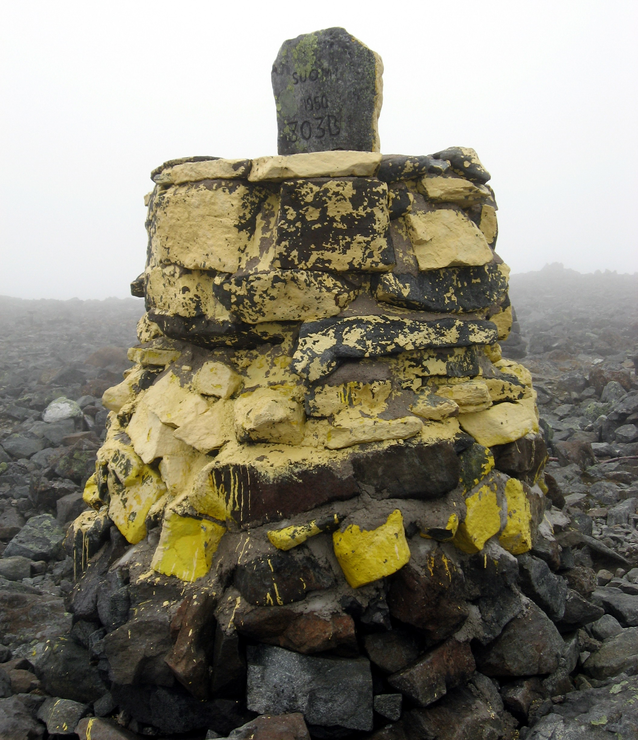 Rajapyykki 303B Suomen korkeimmalla kohdalla Haltin rinteellä.